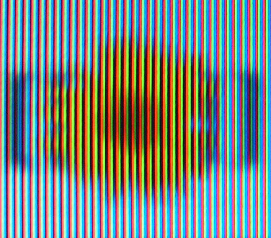 CRT mit Streifenmaske. Von links nach rechts Rot, Grün und Blau.